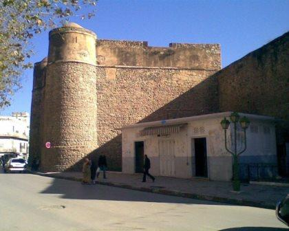 Rempart palais de Mechouar